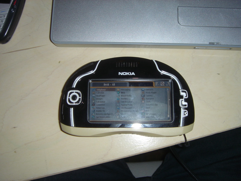 Nokia 7700